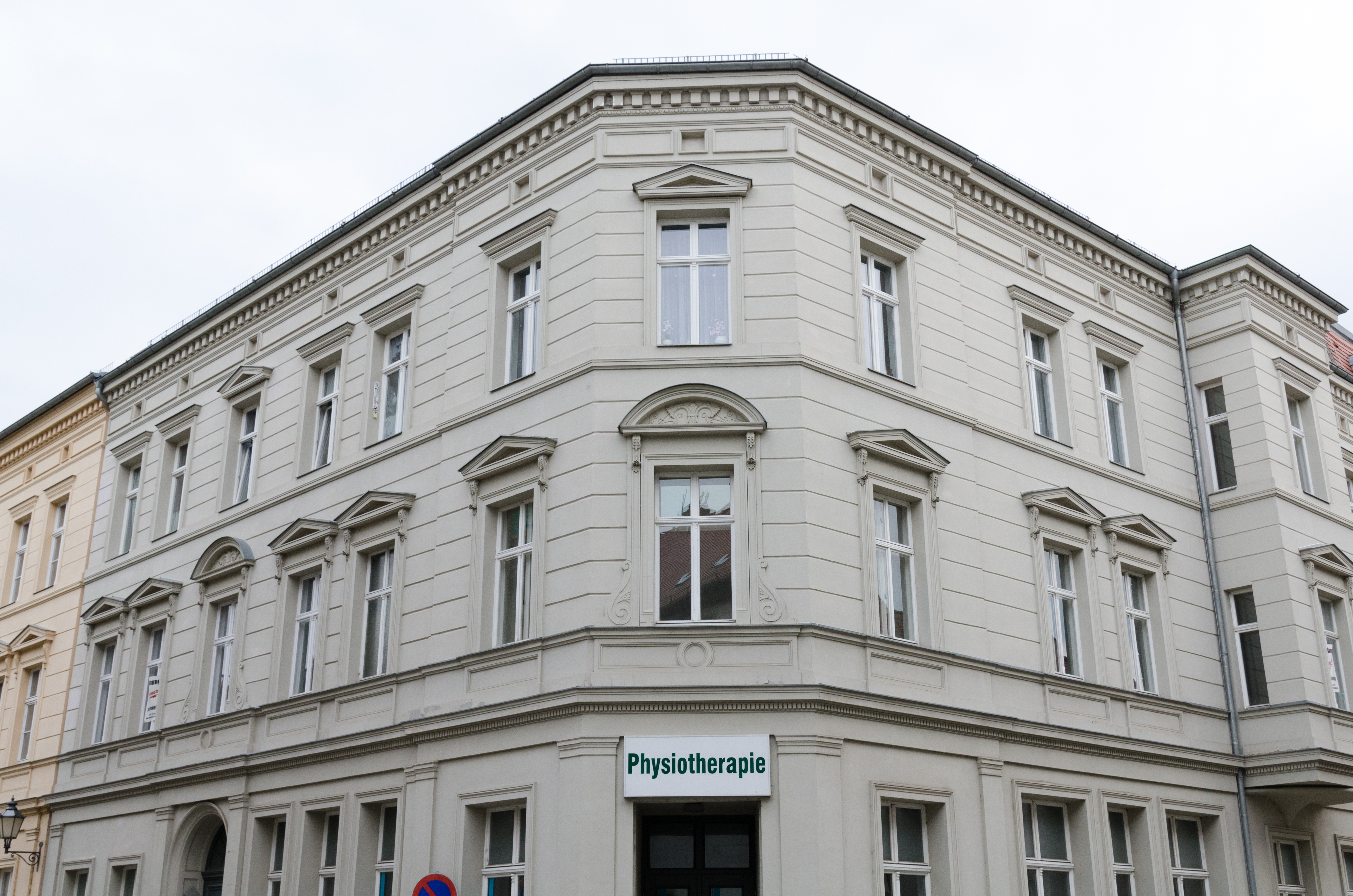 Zeitz, Brüderstraße 16